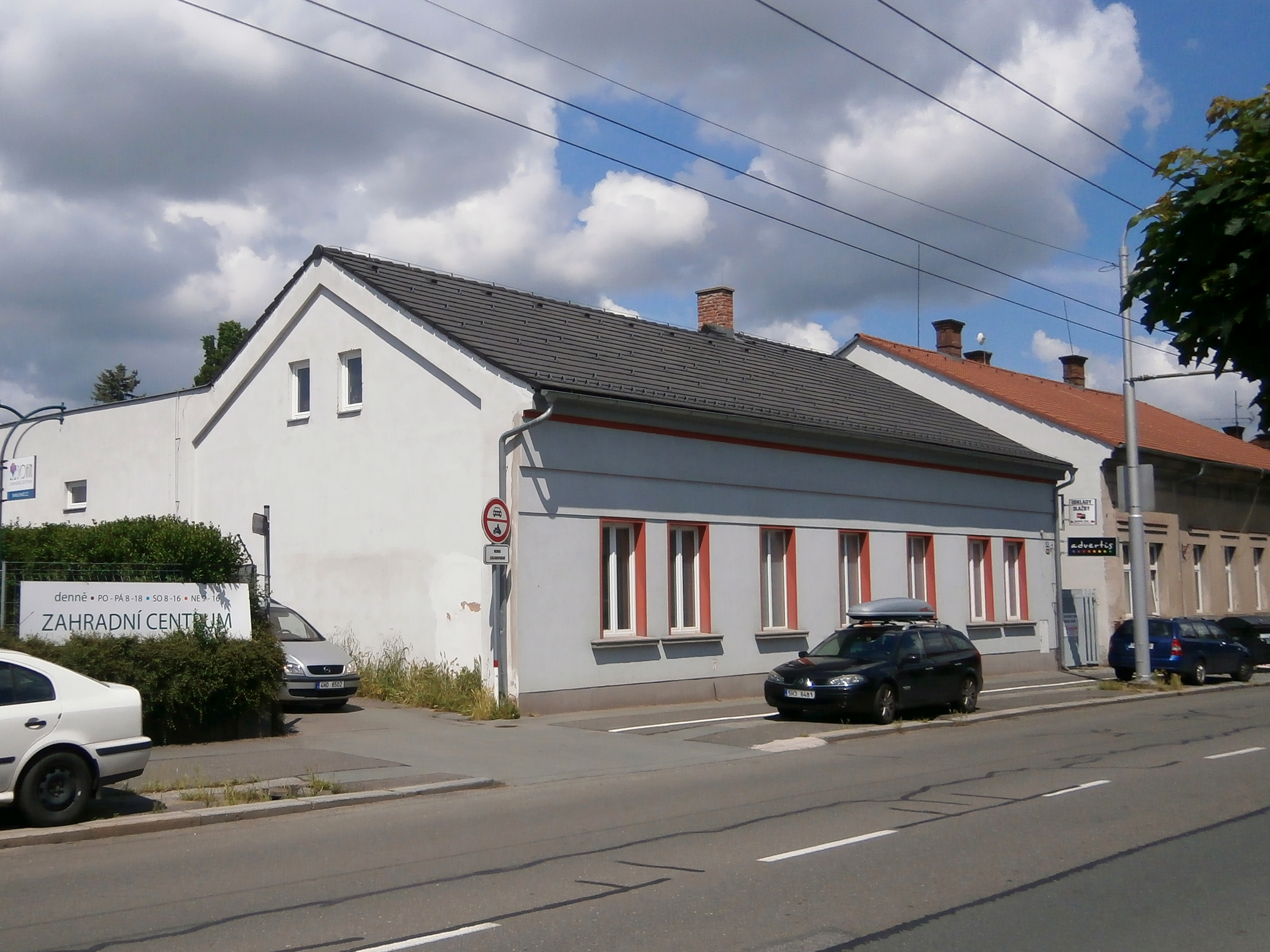 Pražská třída čp. 142